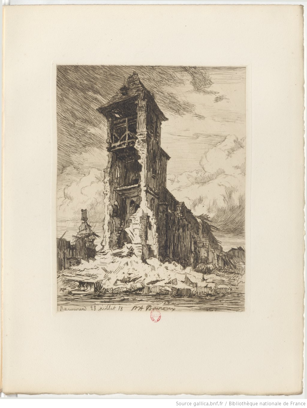 Eglise Dammard Guerre 14-18